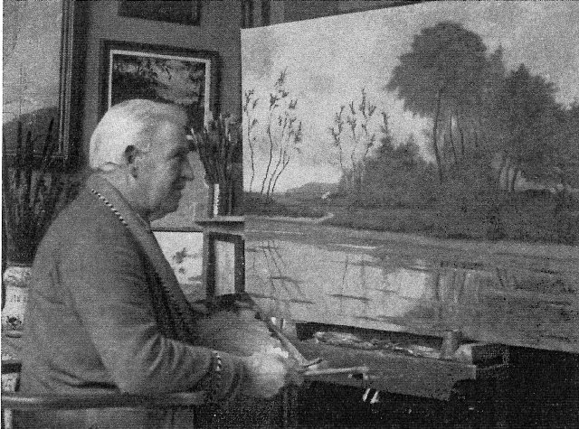 Jaak van Wijck